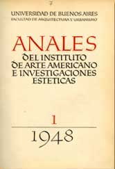 Tapa del primer Anales del Instituto de Arte Americano publicado en el año 1948